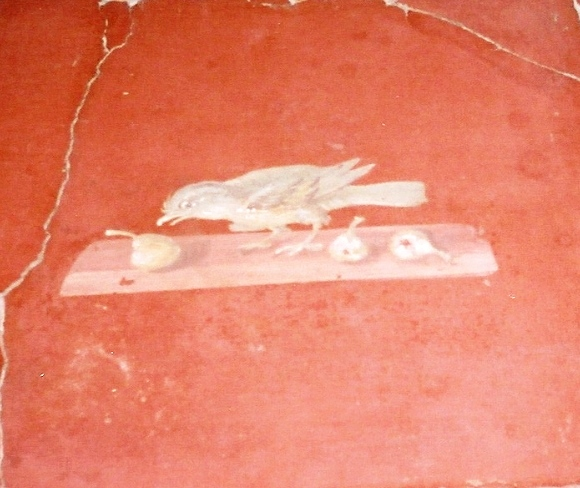 Détail d'une fresque de la villa de Poppée à Oplontis (Italie)